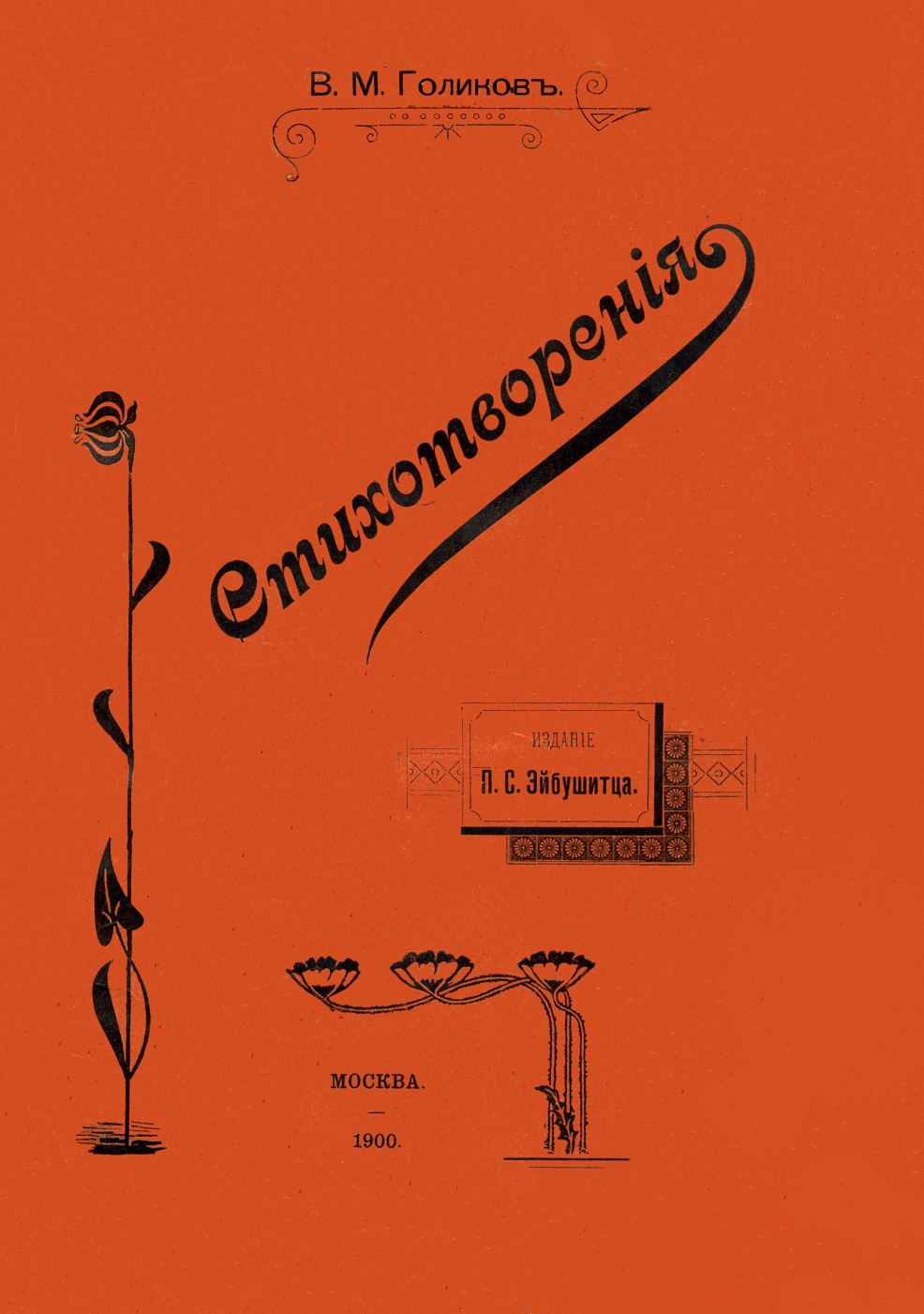 Cover of "Стихотворения" (Poems) by V. M. Golikov